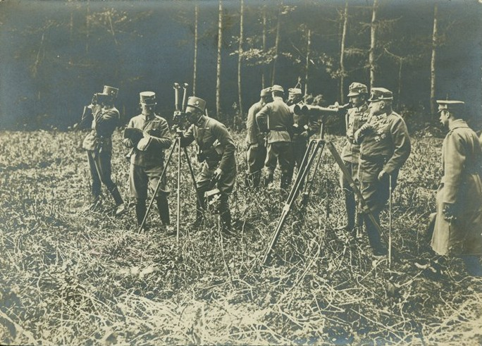 Снимка на съвместни български и австро-унгарски военни учения. Цар Фердинанд и престонаследника Борис, заедно с ерцхерцог Карл Франц Йозеф.